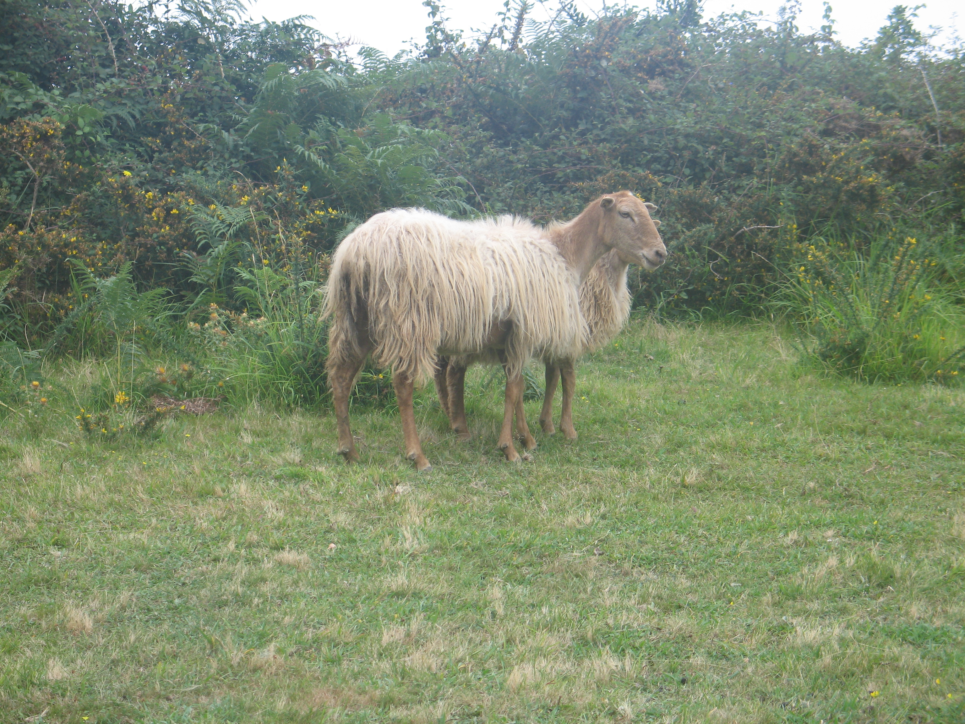 Sasardiak otadi batean